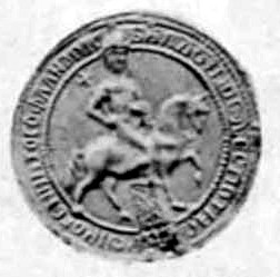 Sceaux de Baudouin II de Courtenay